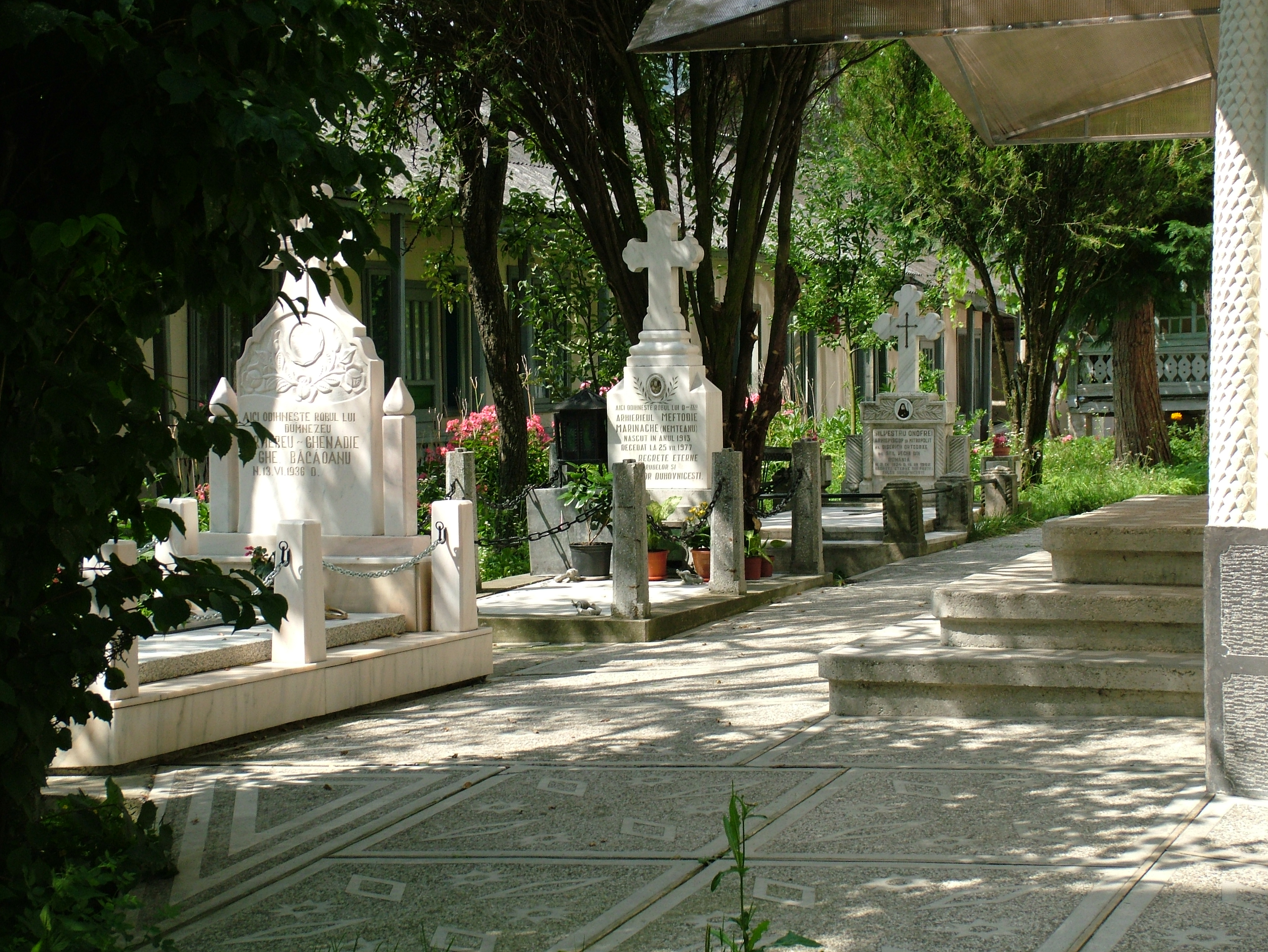 Slătioara 727469, Romania